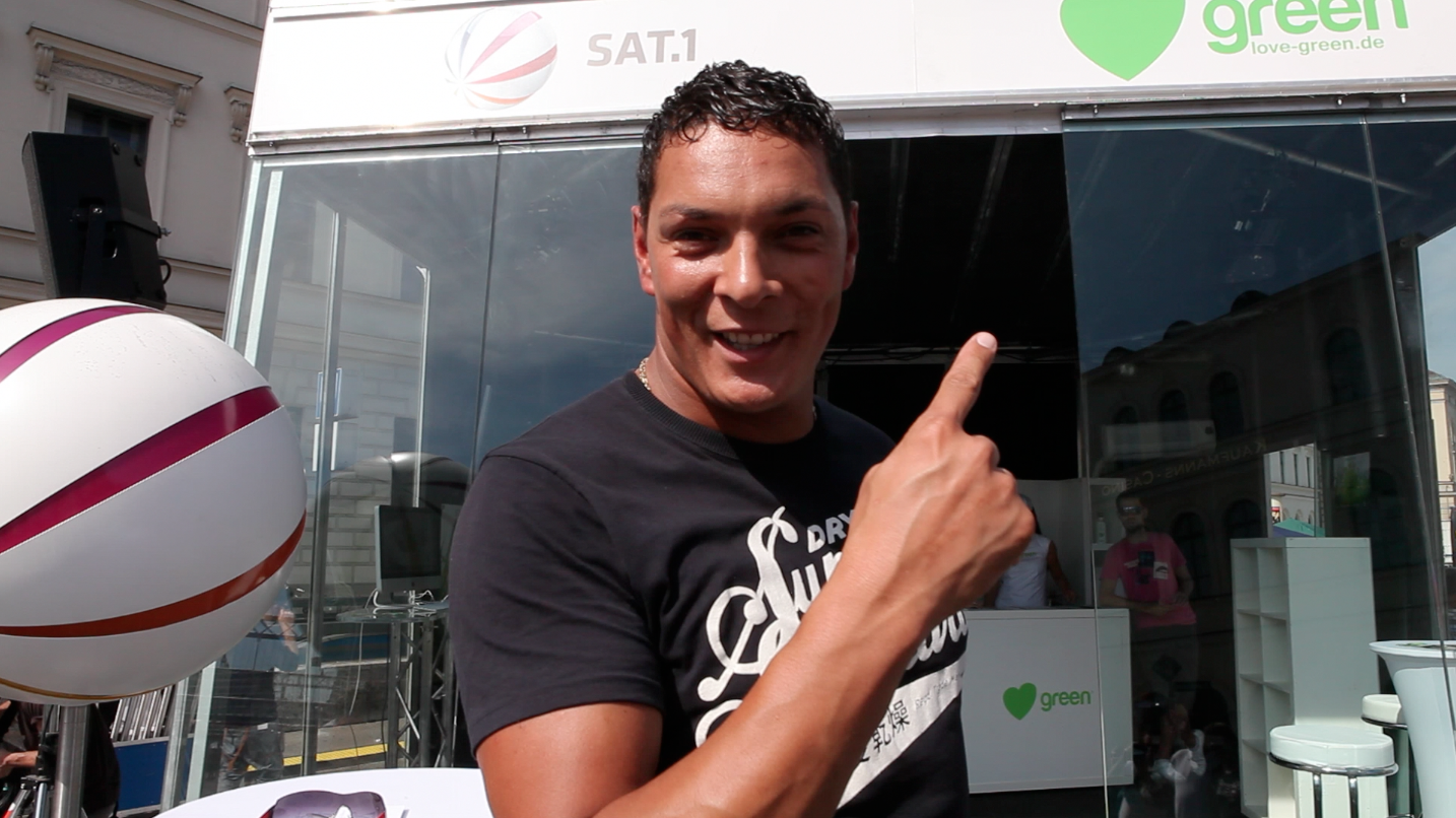 Loves Green: TV-Ermittler Mischa File (Niedrig & Kuhnt)